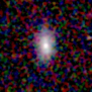 Galaxy NGC 31